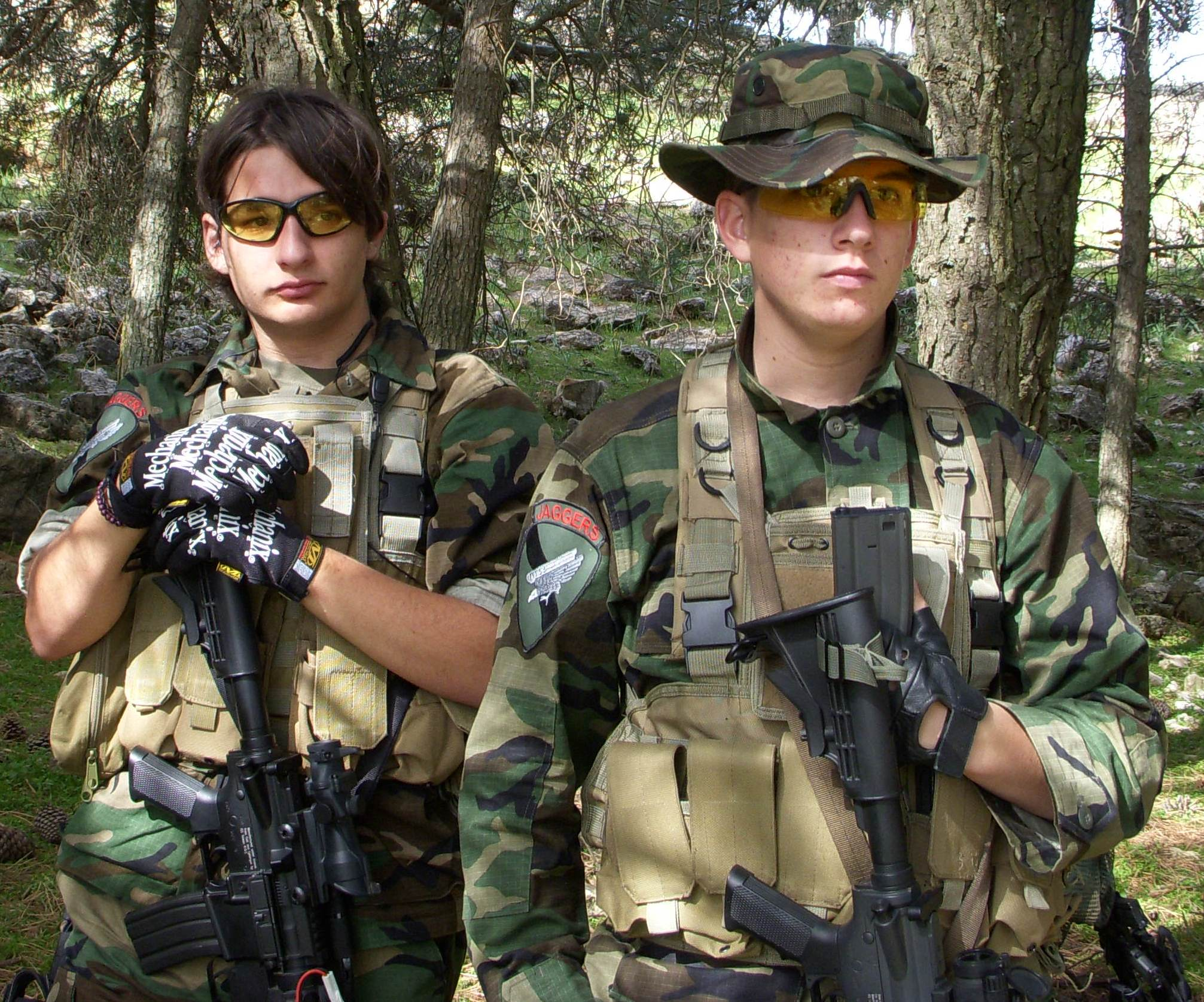 Ejemplo de chaleco táctico para airsoft